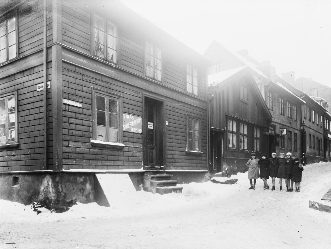 Vinkelgaten sett fra Bakkegaten, ca. 1920. Foto: Johannes Holmsen/Oslo Museum.